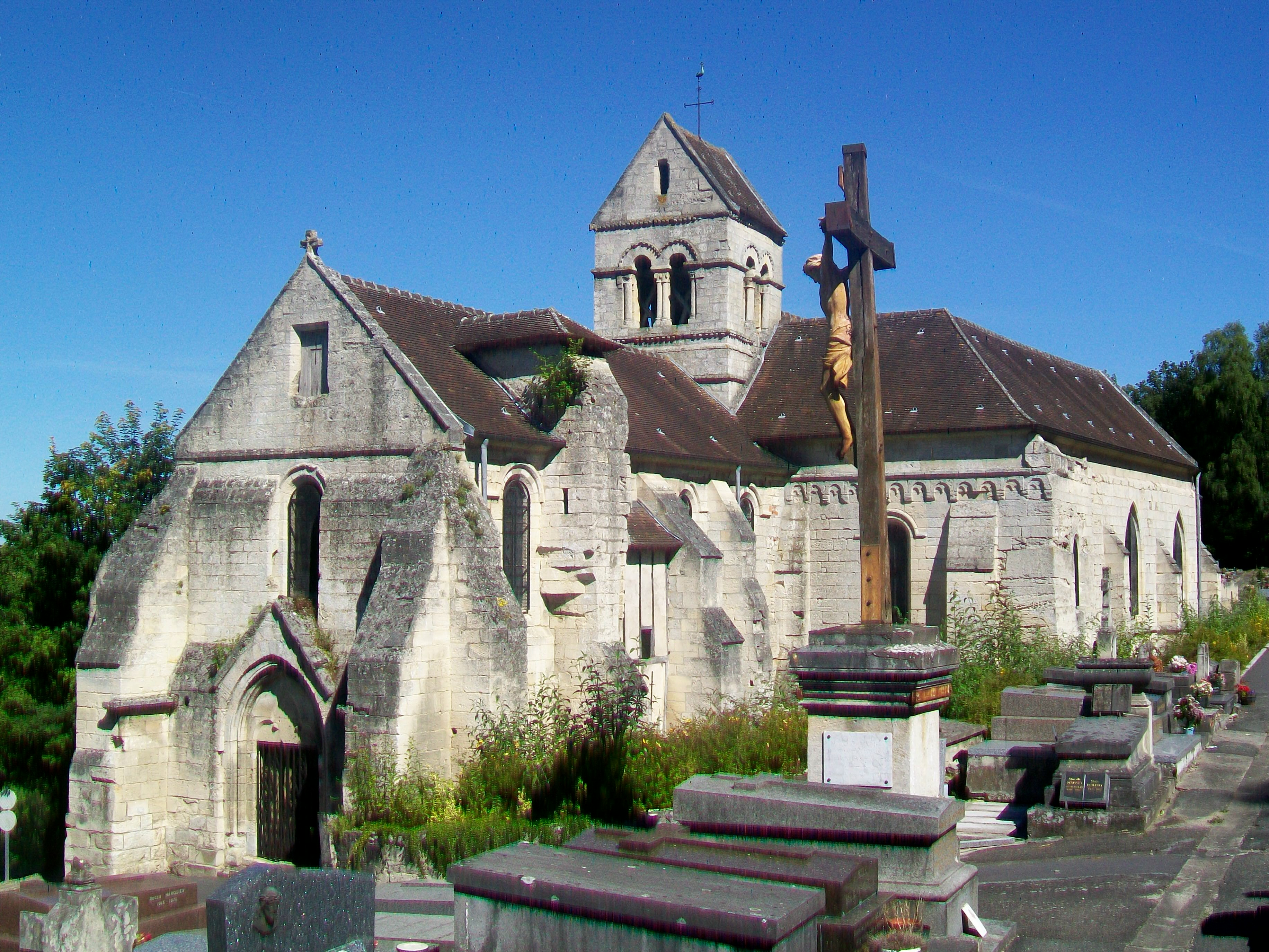 L'église Saint-Remi depuis le nord-ouest.